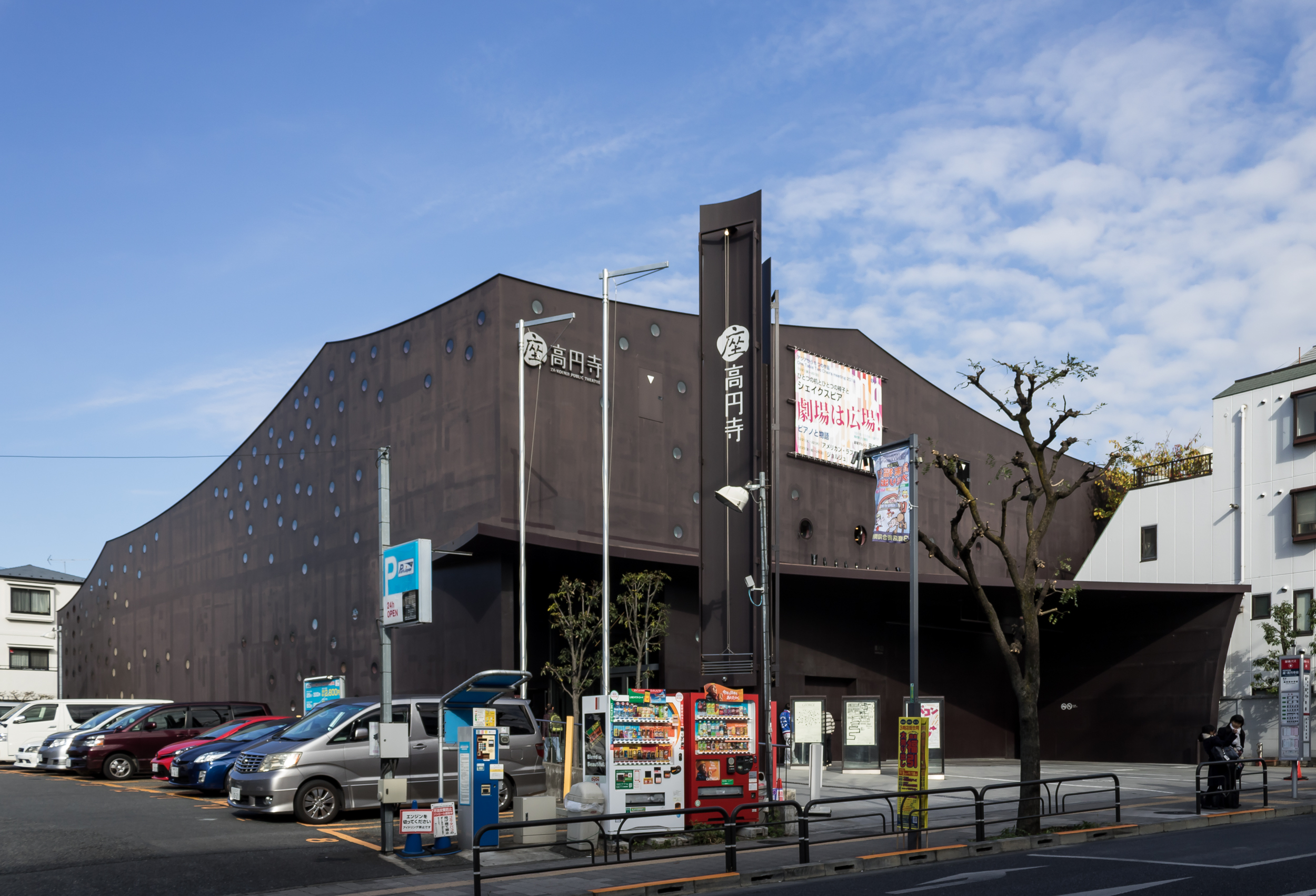 杉並区立杉並芸術会館（座・高円寺）、伊東豊雄設計。